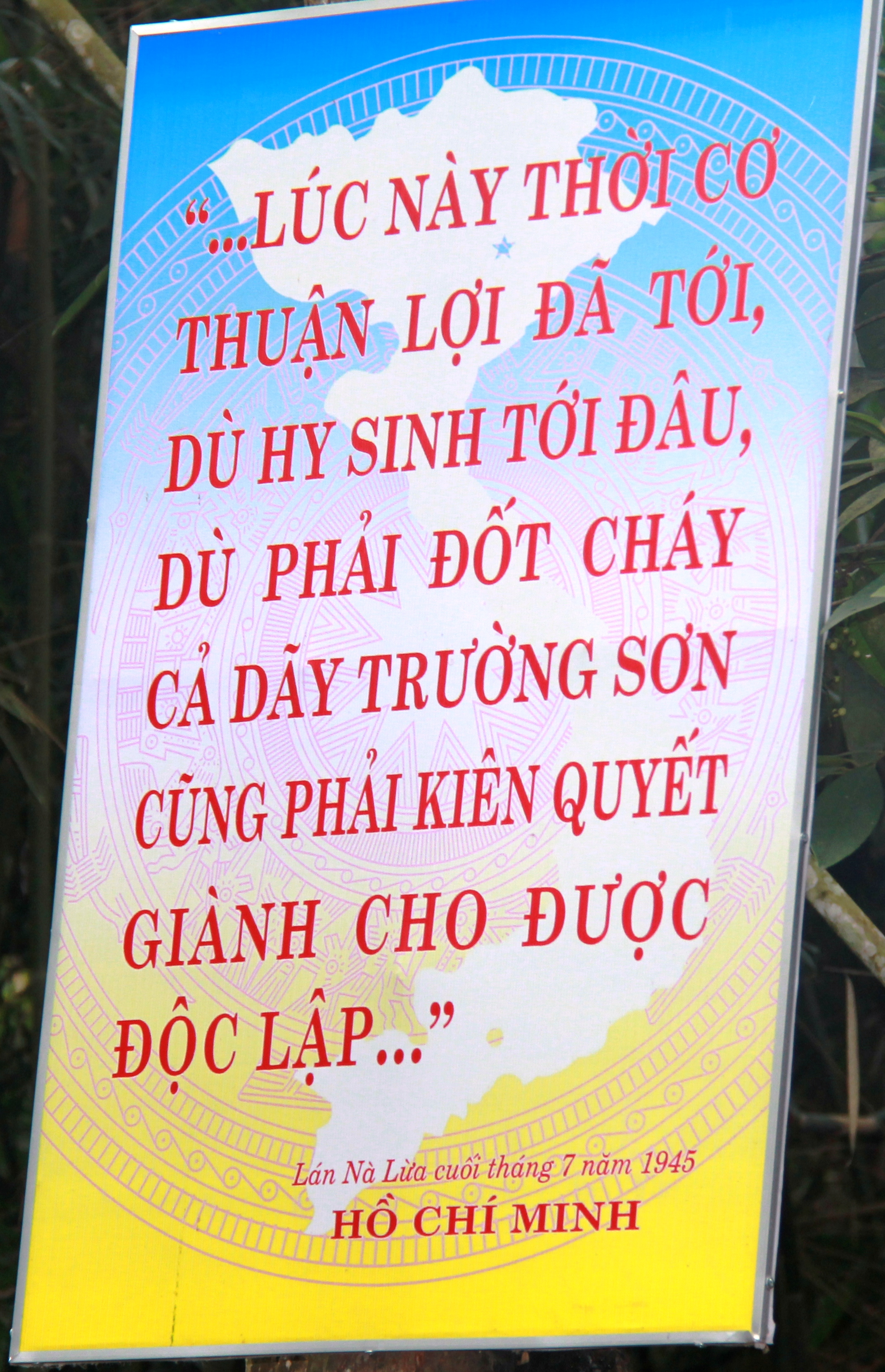 Hình chụp bằng máy ảnh cá nhân về chỉ thị của Hồ Chủ tịch phát động lệnh tổng khởi nghĩa năm 1975